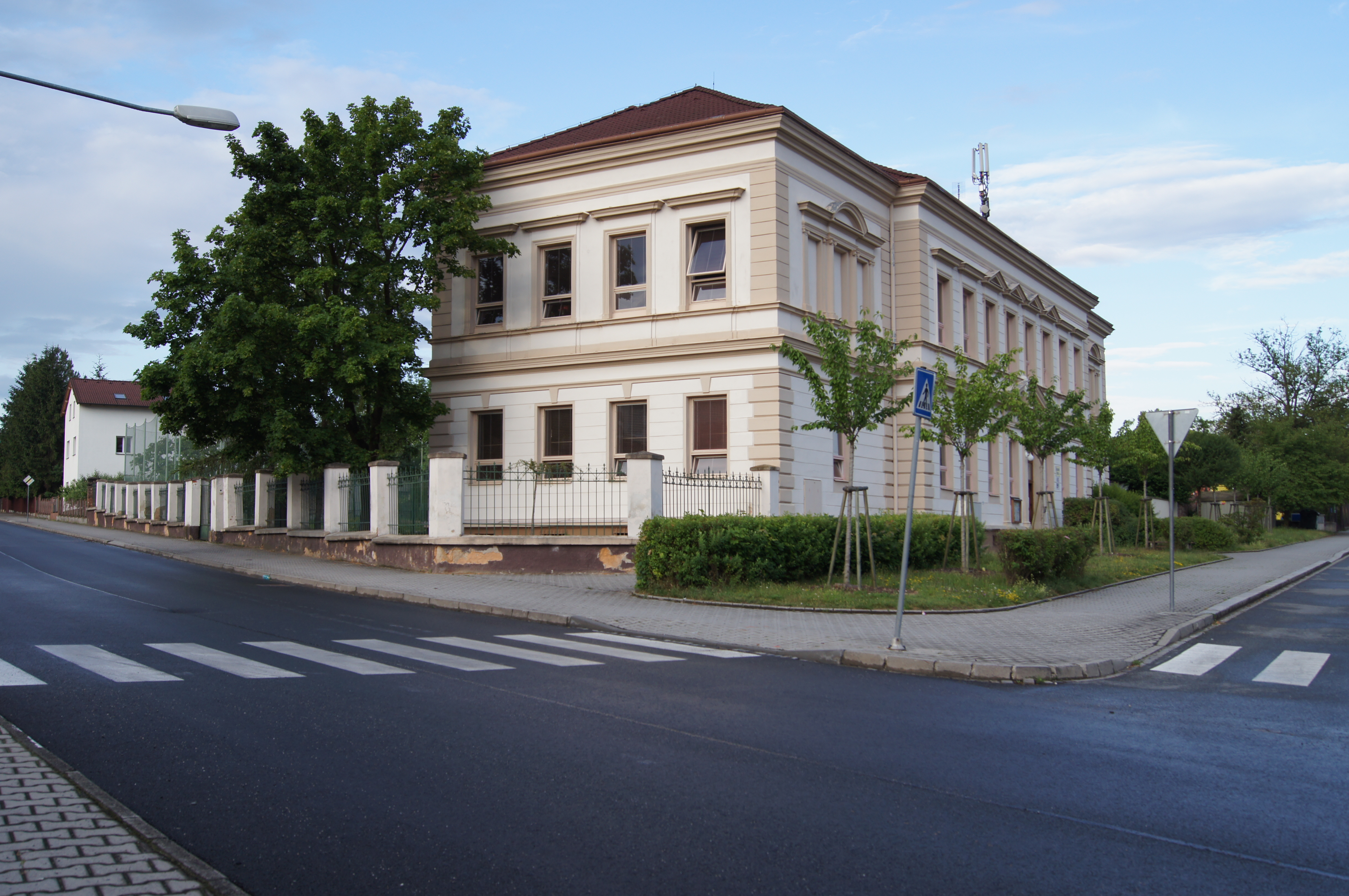 Pohled na Základní školu v Újezdě z křižovatky ulice V Brance a Národní